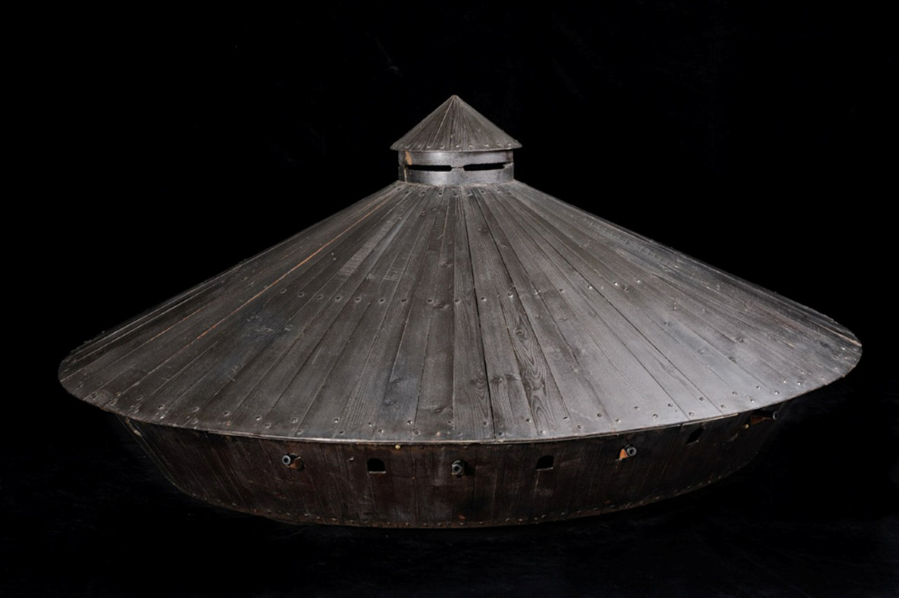 Il modello rappresenta un carro armato a forma di testuggine, rinforzato con piastre metalliche e aperto da un lato per poter vedere l'interno. È sormontato da una torretta interna di avvistamento e armato di cannoni. Il movimento del carro è garantito da otto uomini che azionavano dall'interno un sistema di ingranaggi collegato alle quattro ruote Funzione Il carro è pensato per portare panico e distruzione tra i nemici Modalità d'uso La direzione del fuoco poteva essere decisa dagli uomini posti nella parte alta del carro, da dove, attraverso delle strette fessure, potevano vedere il campo di battaglia.